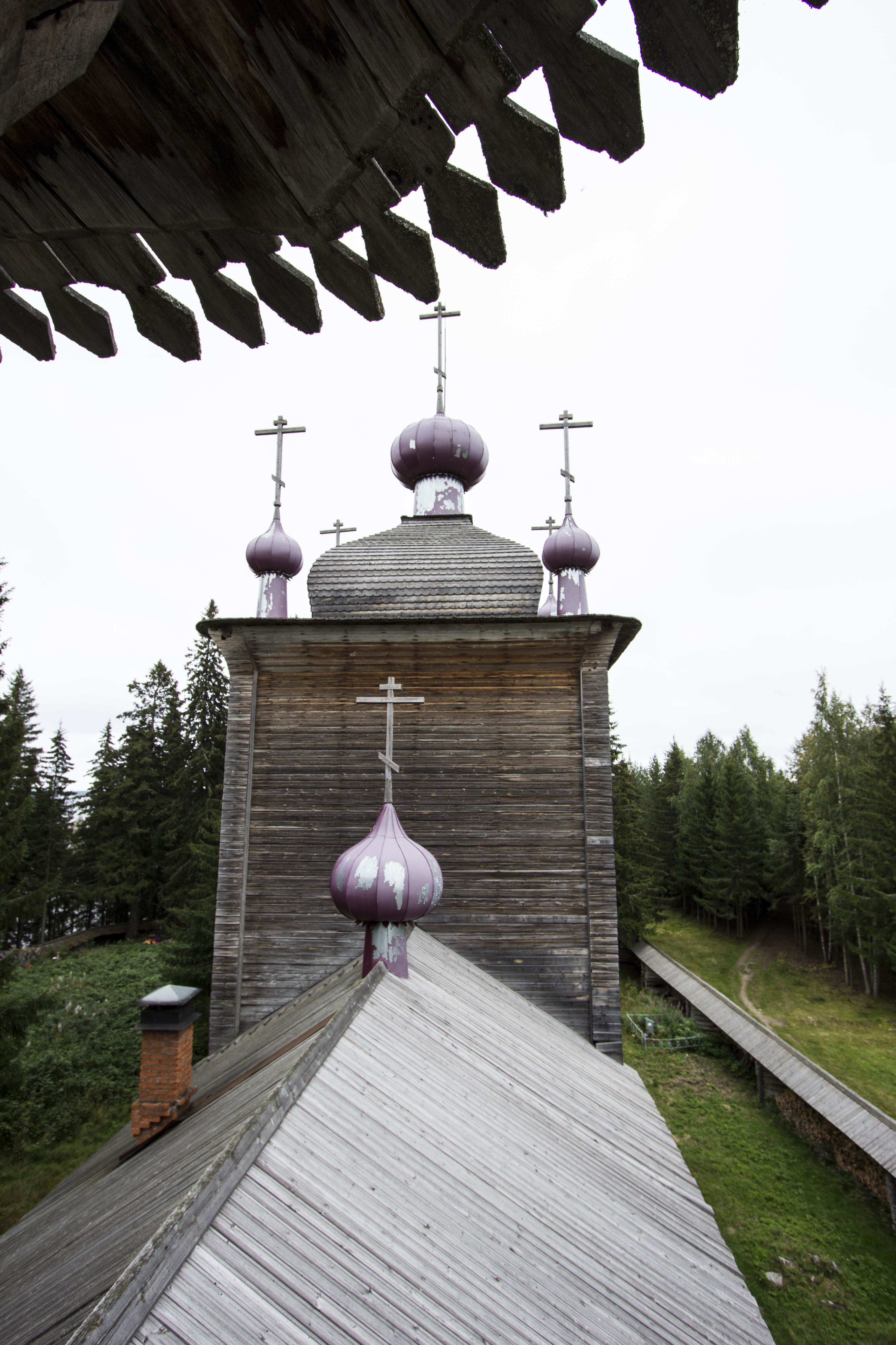 Церковь Ильи Пророка